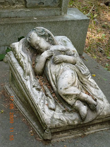 Rzeźba nagrobna Opole ul. Wrocławska Cmentarz